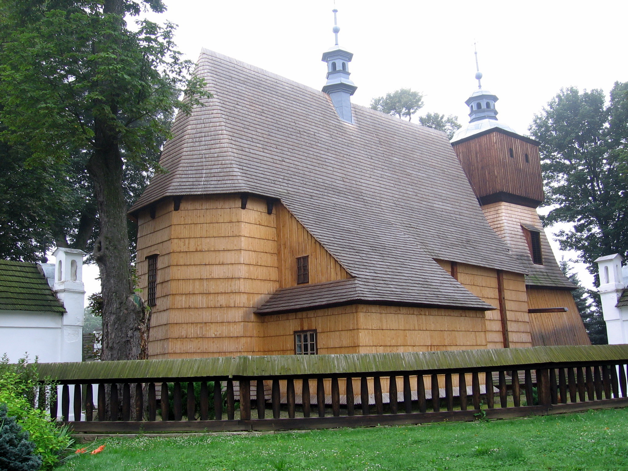 Kościół par. p.w. Wszystkich Świętych Blizne 436, Jasienica Rosielna